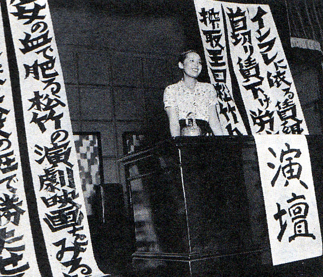 「桃色争議」の最中、演壇に立つ水の江瀧子。